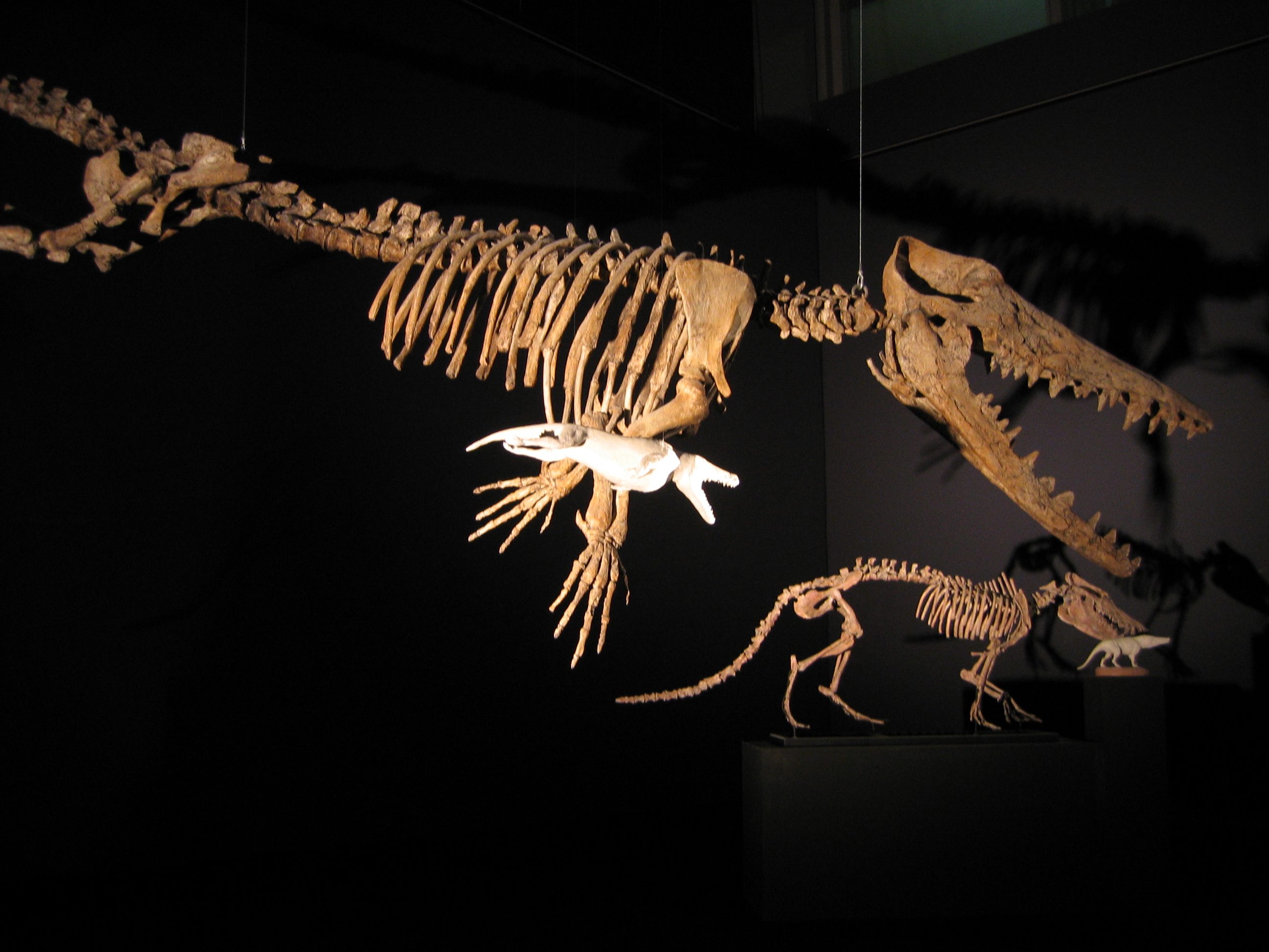 Ambulocetus au premier plan et Pakicetus au second plan